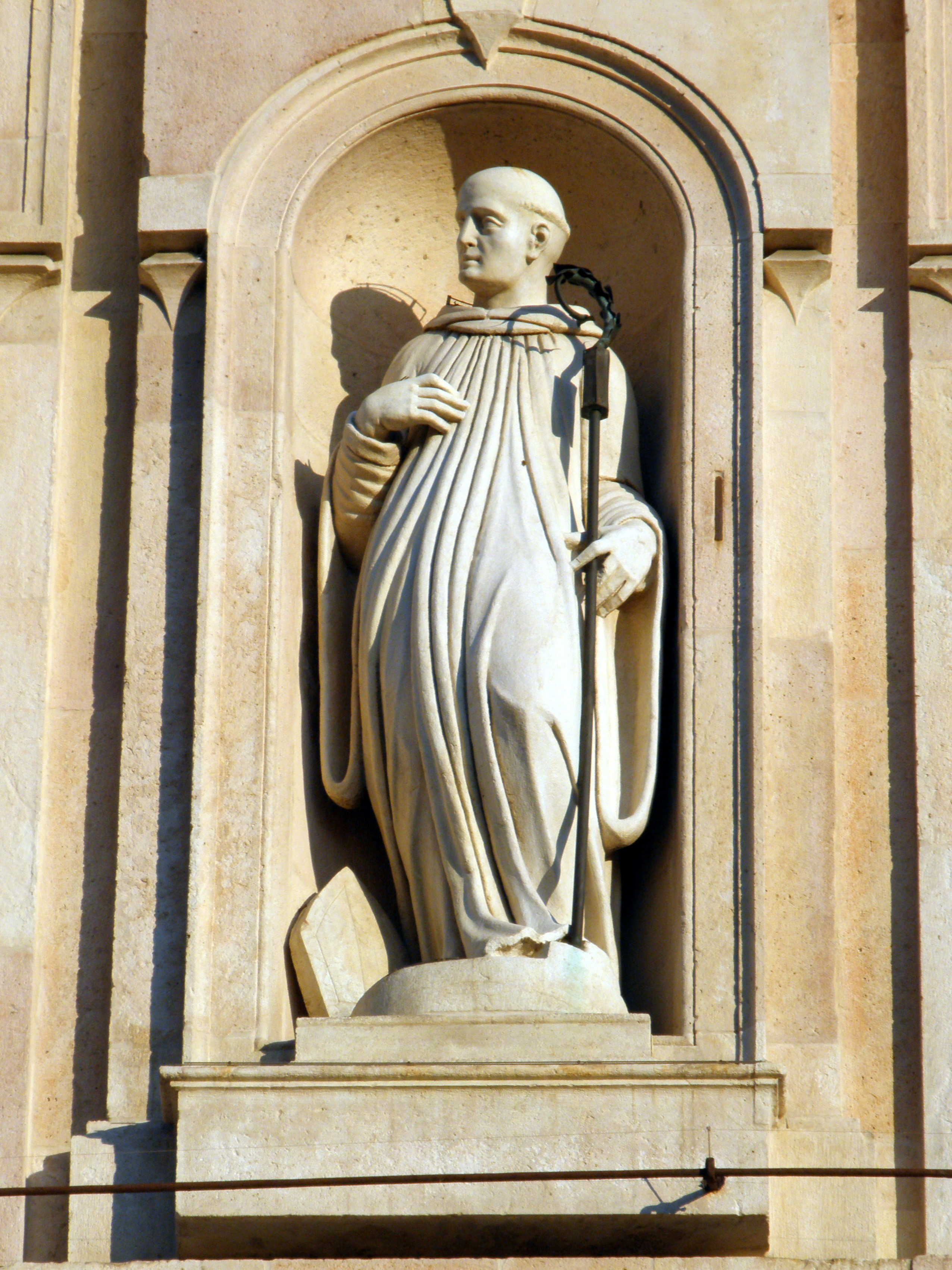 Parma, chiesa di San Giovanni Evangelista: San Mauro Abate, una delle statue che ornano la facciata.